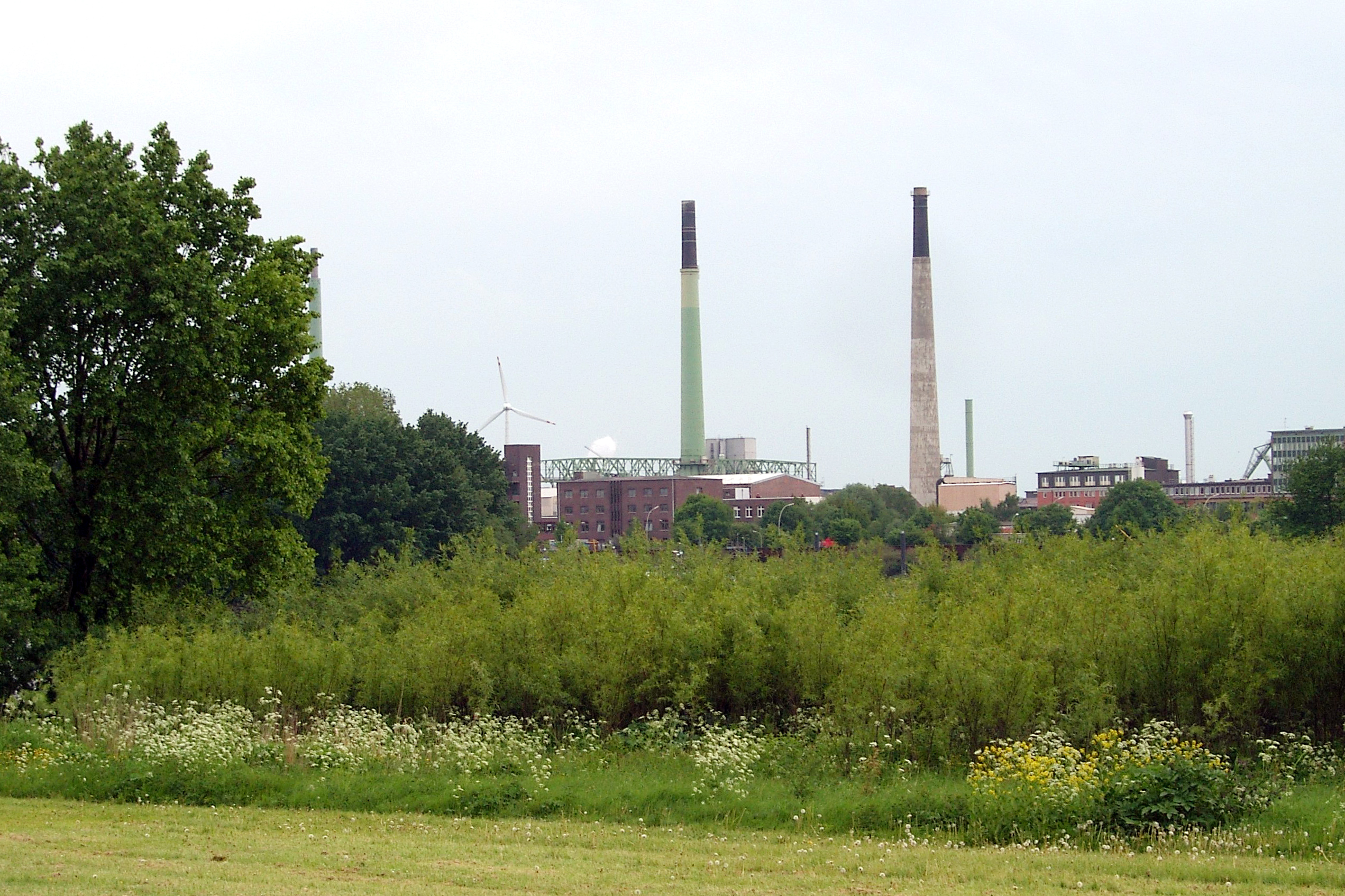 Blick von der zu Rothenburgsort gehörenden Halbinsel Entenwerder auf die Industrieanlagen auf der Peute, die zur Veddel gehört.